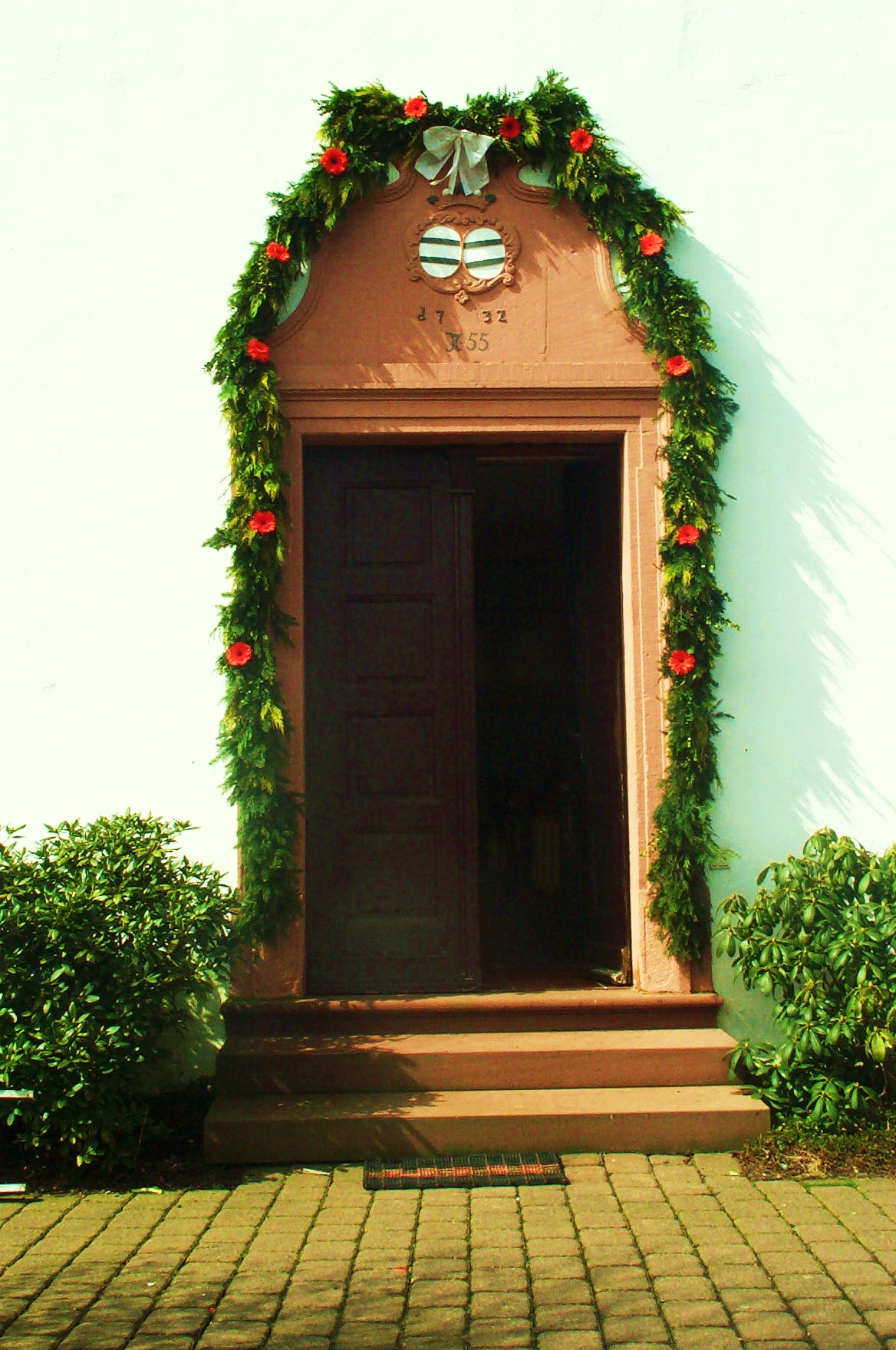 Eingang der Lichenrother Kirche mit dem Ysenburger Wappen & dem Konfirmationsschmuck